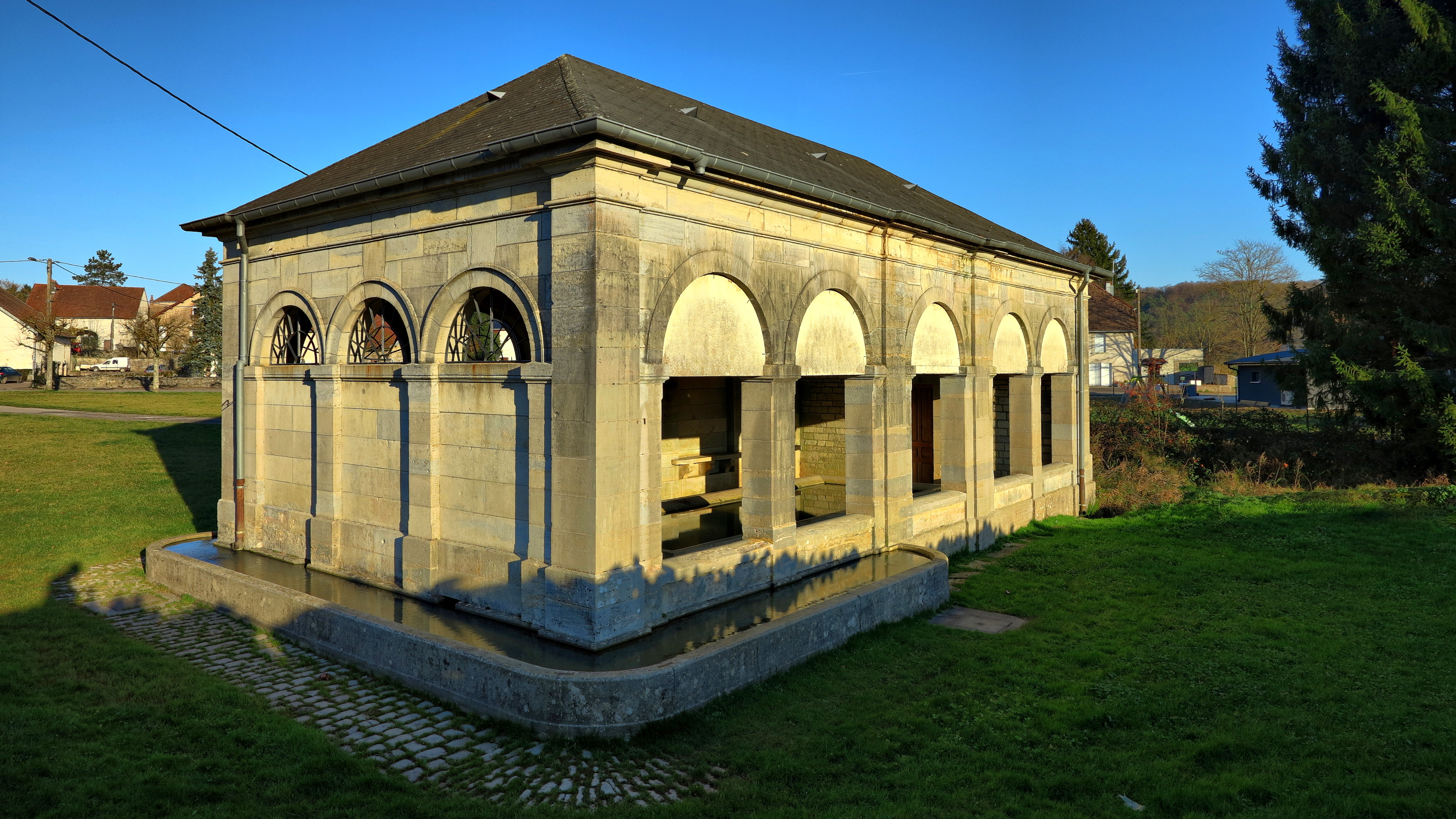 Le lavoir-abreuvoir d'Authoison